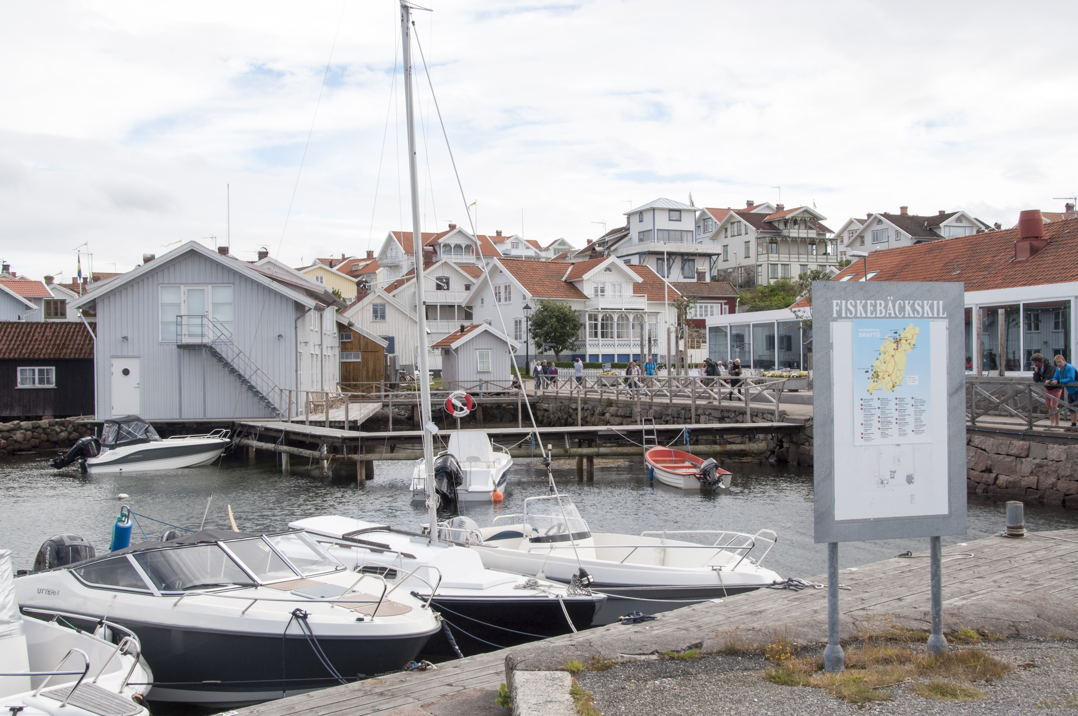 Fiskebäckskil